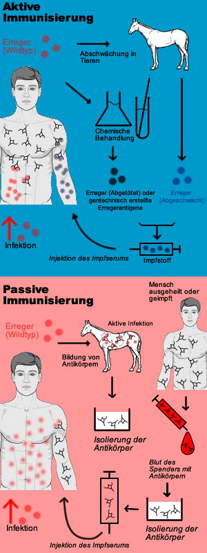 Schema der Aktiven / Passiven Immunisierung (Sonstiges: Bei Fehlern bitte melden! ich werde das Bild dann aktualisieren)